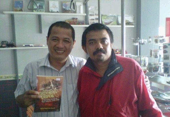 Agus Sutondo Foto Dengan Wenri Wanhar Penulis Gedoran Depok